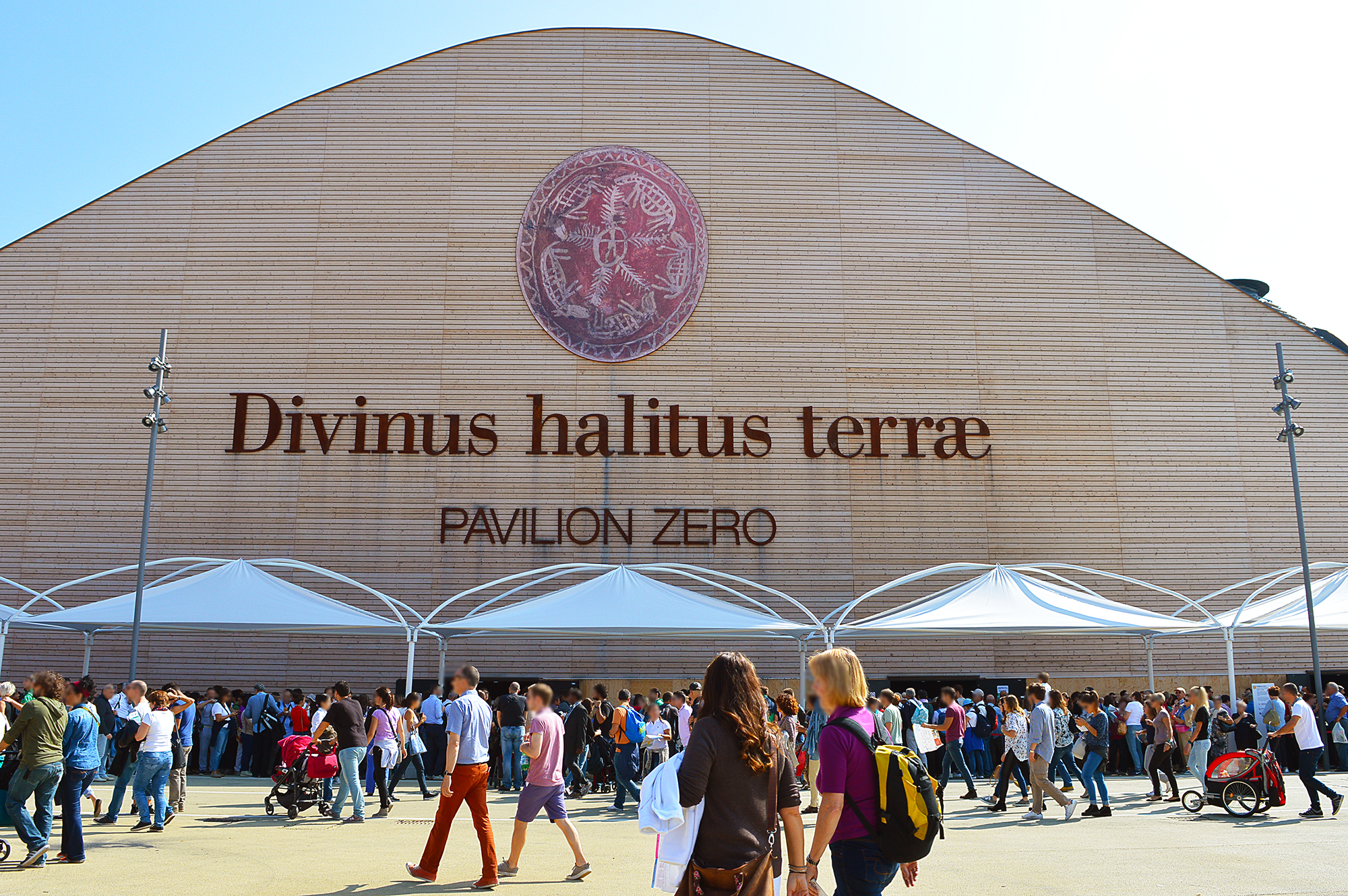 Facciata anteriore del Padiglione Zero di EXPO 2015